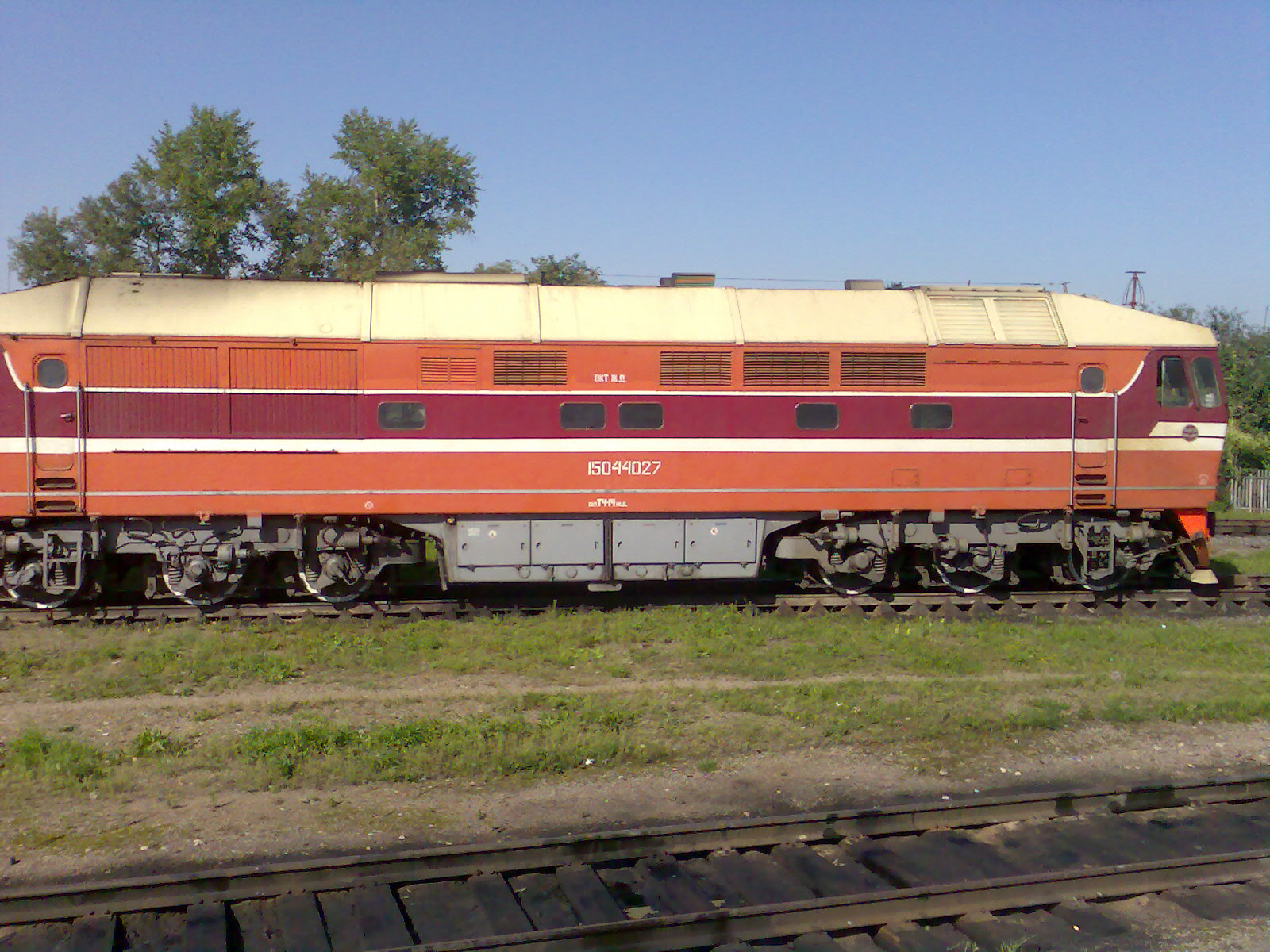 Тепловоз ТЭП70-0402. ст. Волоколамск